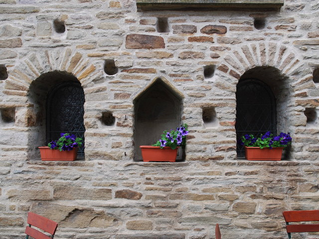 evangelische Dorfkirche Wengern, Kirchstr. 8, Wetter-Wengern; südliche Außenwand der Kirche mit zwei Fenstern, einer zentralen Spitzbogennische und 11 umgebenden „Schädelnischen“ (Reste von Totenschädeln wurden darin bei Renovierungsarbeiten in den 1930er Jahren gefunden, das Alter und die konkrete Bedeutung der Nischen sind unbekannt, eine Art Memento mori wird vermutet) This is a photograph of an architectural monument.